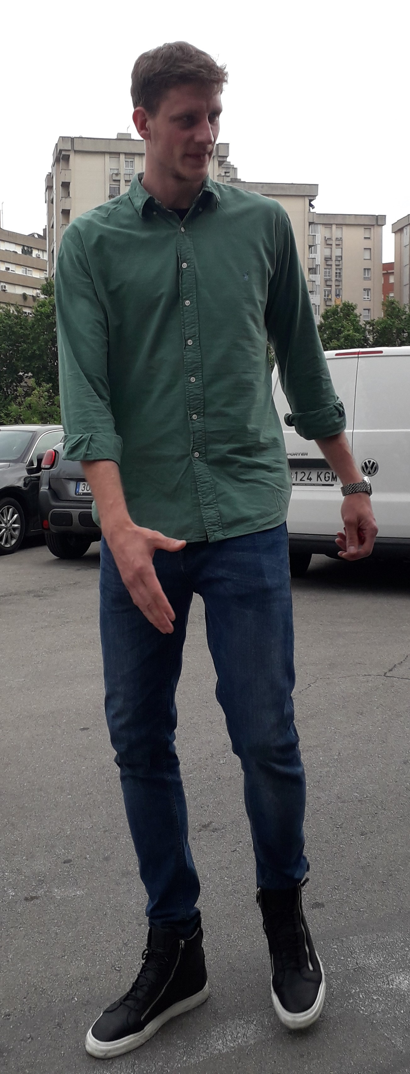 Artem Pustovyi a la entrada del Palau Blaugrana, antes de disputar el 2º partido de semifinales del Play Off ACB 2018-19 ante el Tecnyconta Zaragoza el 9 de junio de 2019